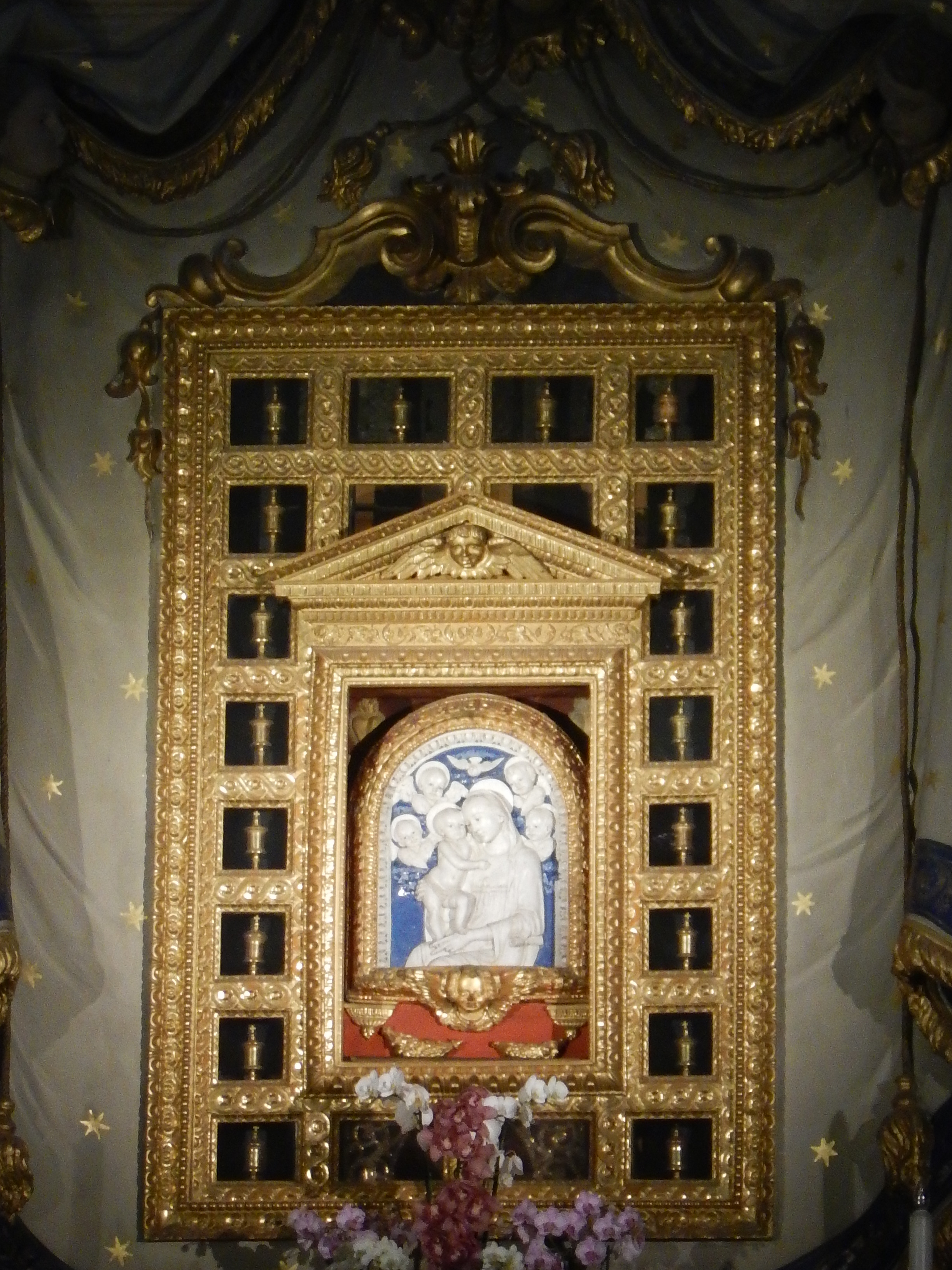 La Vergine di Boccadirio, in terracotta invetriata, che dà il nome al Santuario